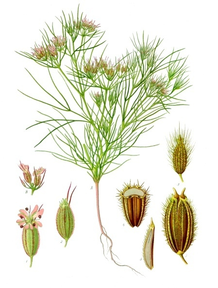 Kreuzkümmel. A Blühende Pflanze. B Döldchen. 1 Blüte vergrössert; 2 Fruchtknoten vergrössert; 3 Reife Früchte vergrössert; 4 Querschnitt der Frucht vergrössert; 5 Längsschnitt der Frucht vergrössert.